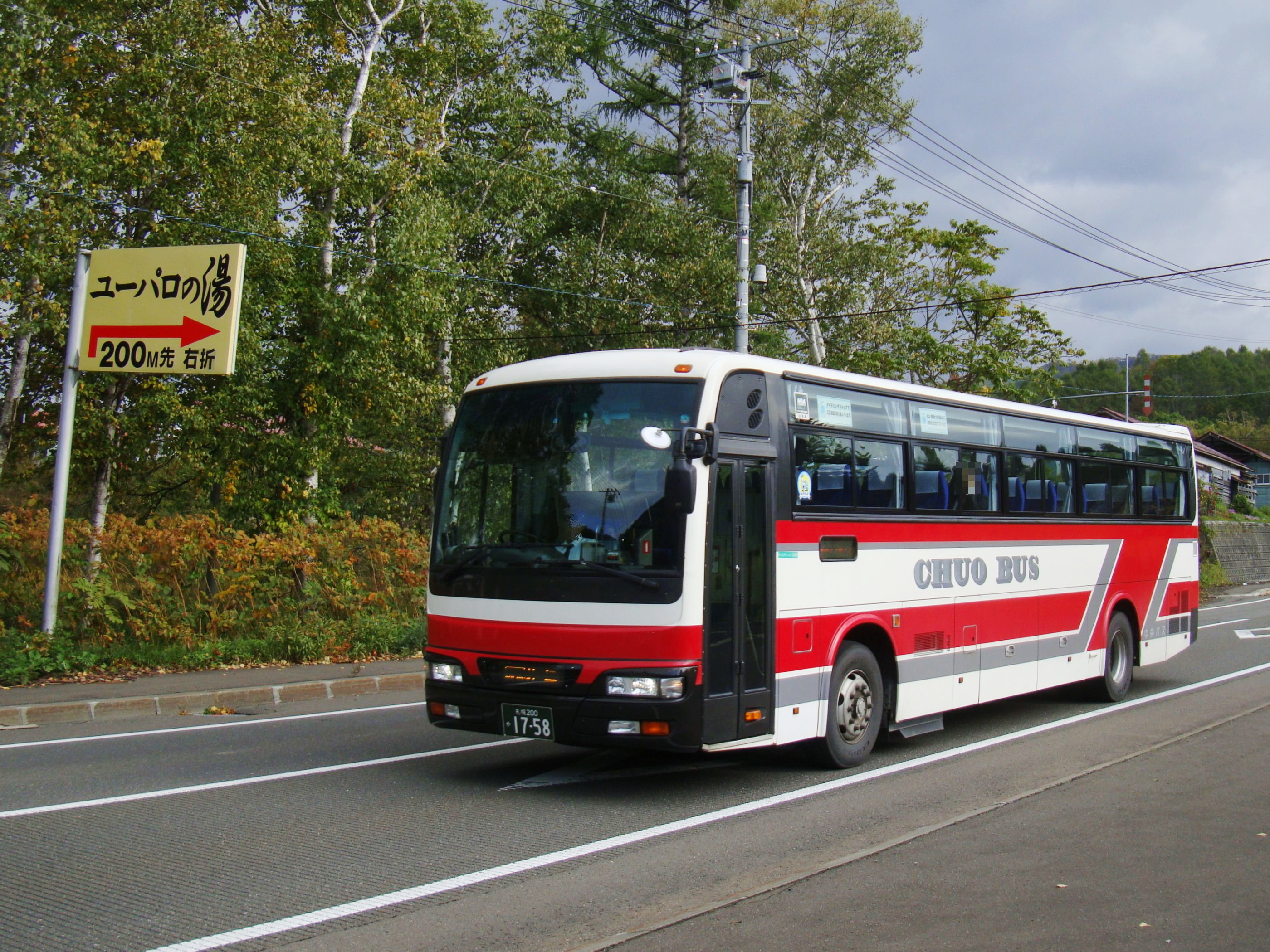 "Kōsoku Yūbari gō" Yūbari to Sapporo